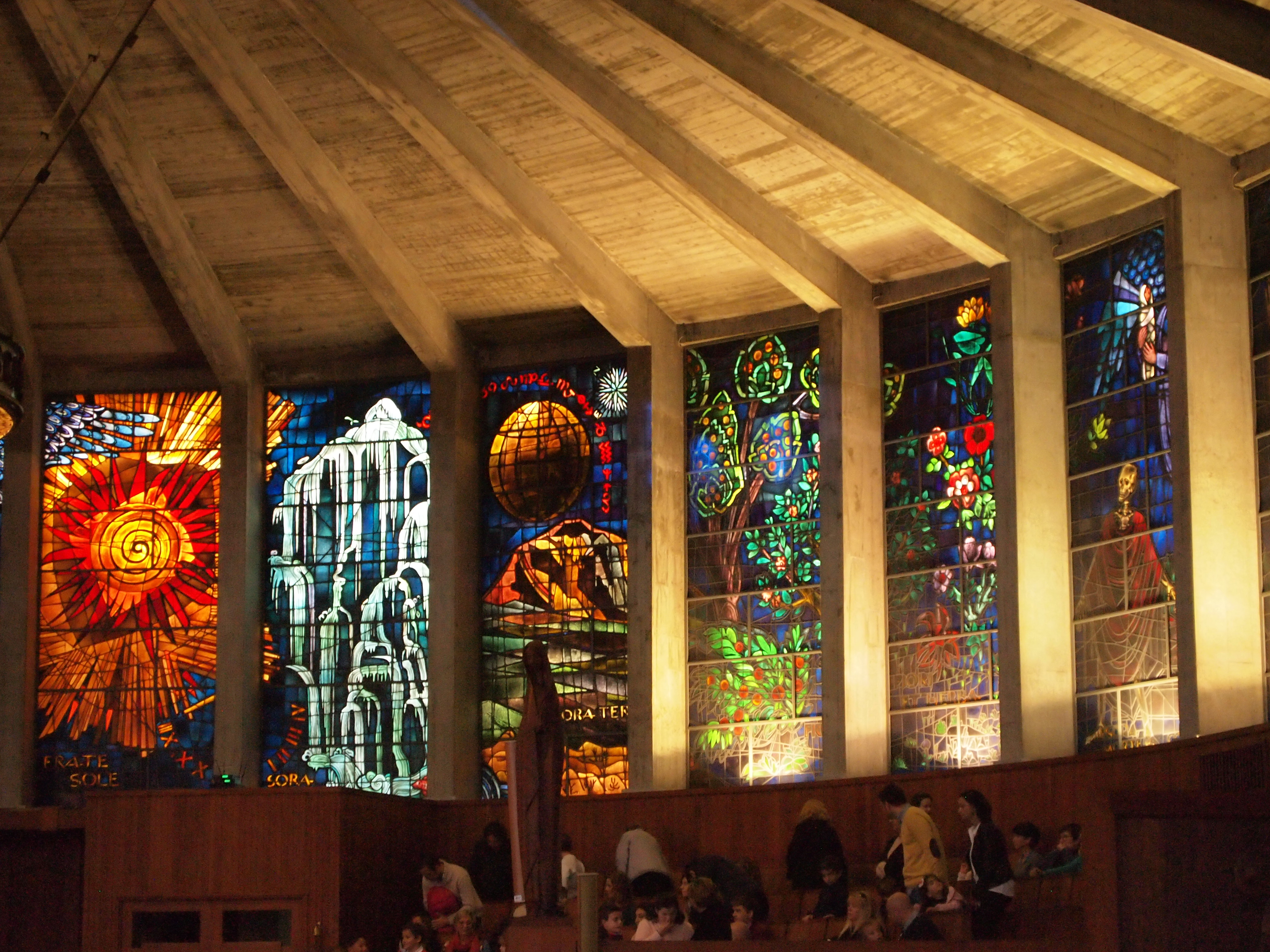 Església de Nostra Senyora dels Àngels de la Porciúncula, a Palma (Mallorca). Vitralls